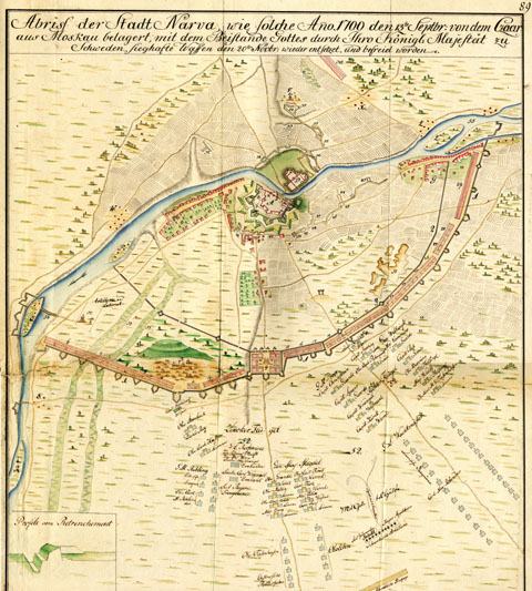 Scan from Johann Christoph Brotze's book Sammlung verschiedner Liefländischer Monumente. Abriss der Stadt Narva, wie solche Anno 1700 den 13-te Sept. von dem Czaar aus Moskau belagert, mit dem Beistande Gottes durch Ihro Königl. Majestät zu Schweden … [die Karte].